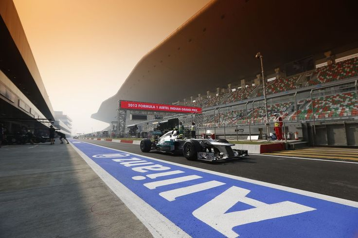 Az Allianz kiemelt támogatója a Forma–1-nek